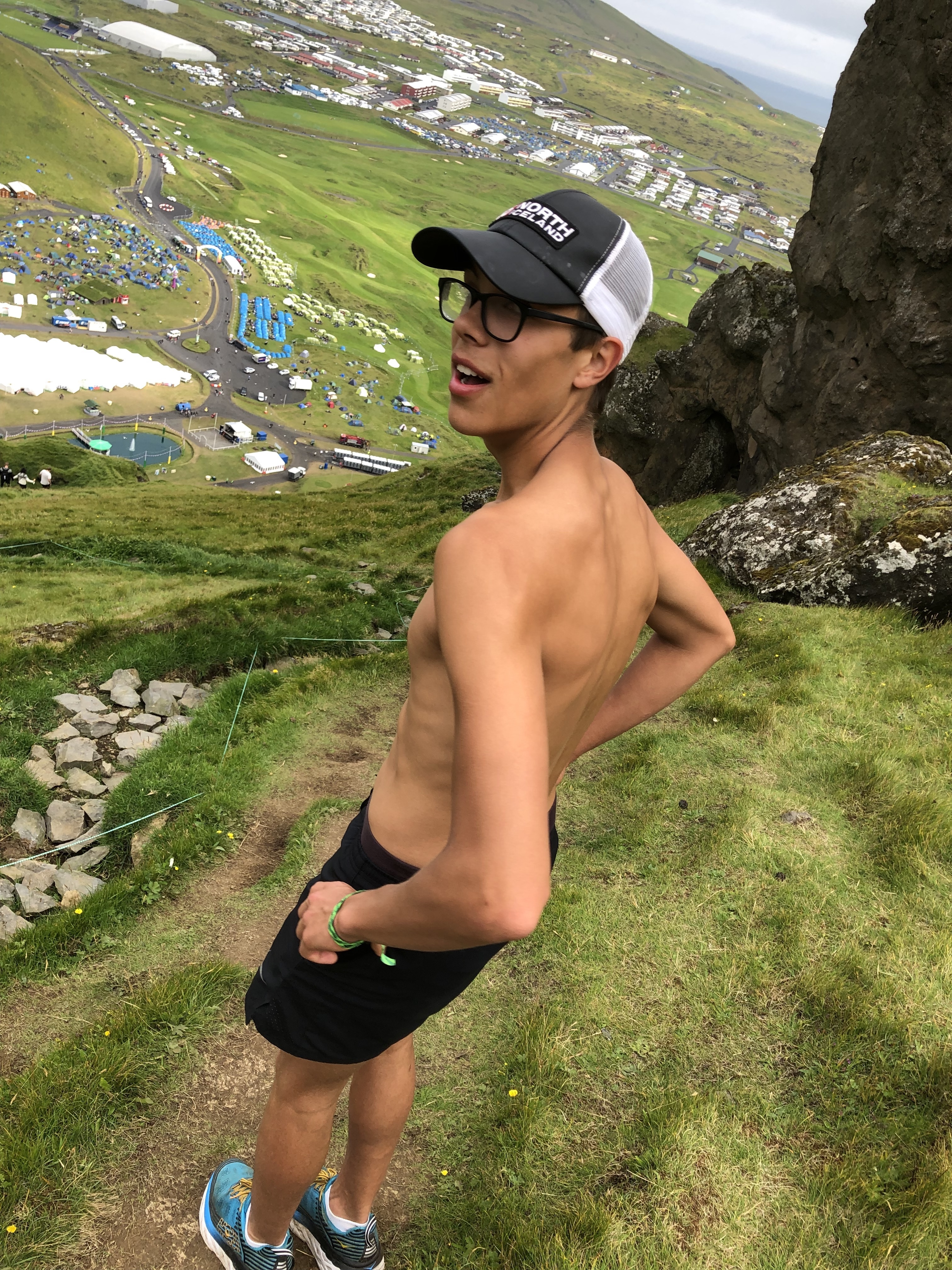 Hlynur staddur í Heimaey